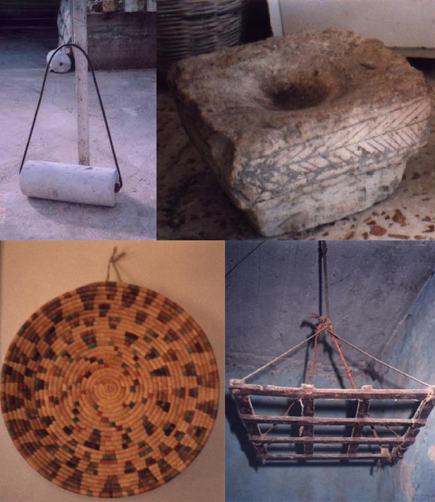 محدلة، جرن، كبك وسدر قش - أدوات قديمية كانت تستعمل في بلدة عبا - جنوب لبنان